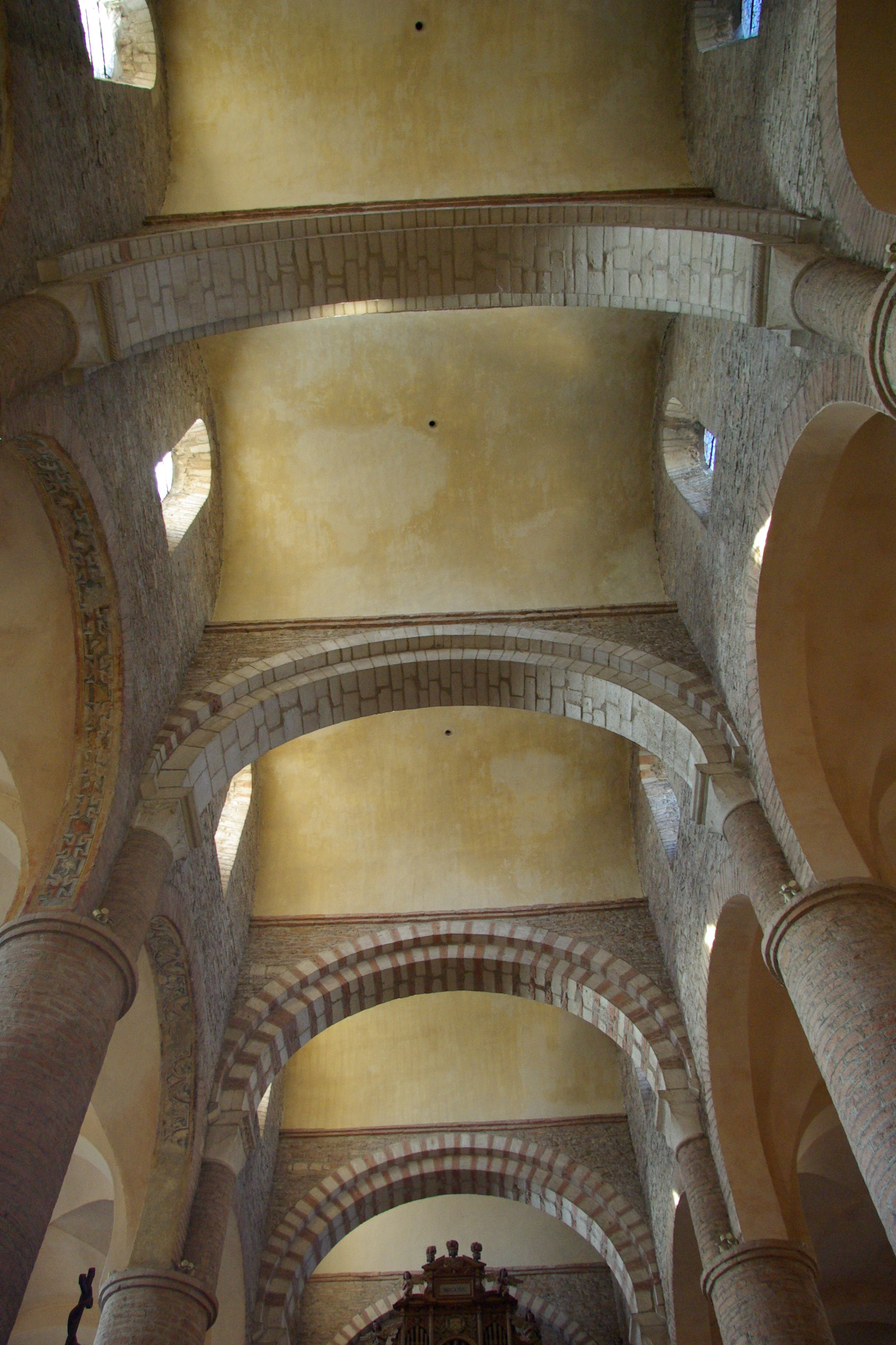 Voûtes de l'Abbaye Saint-Philibert de Tournus en berceau en plein cintre transversales